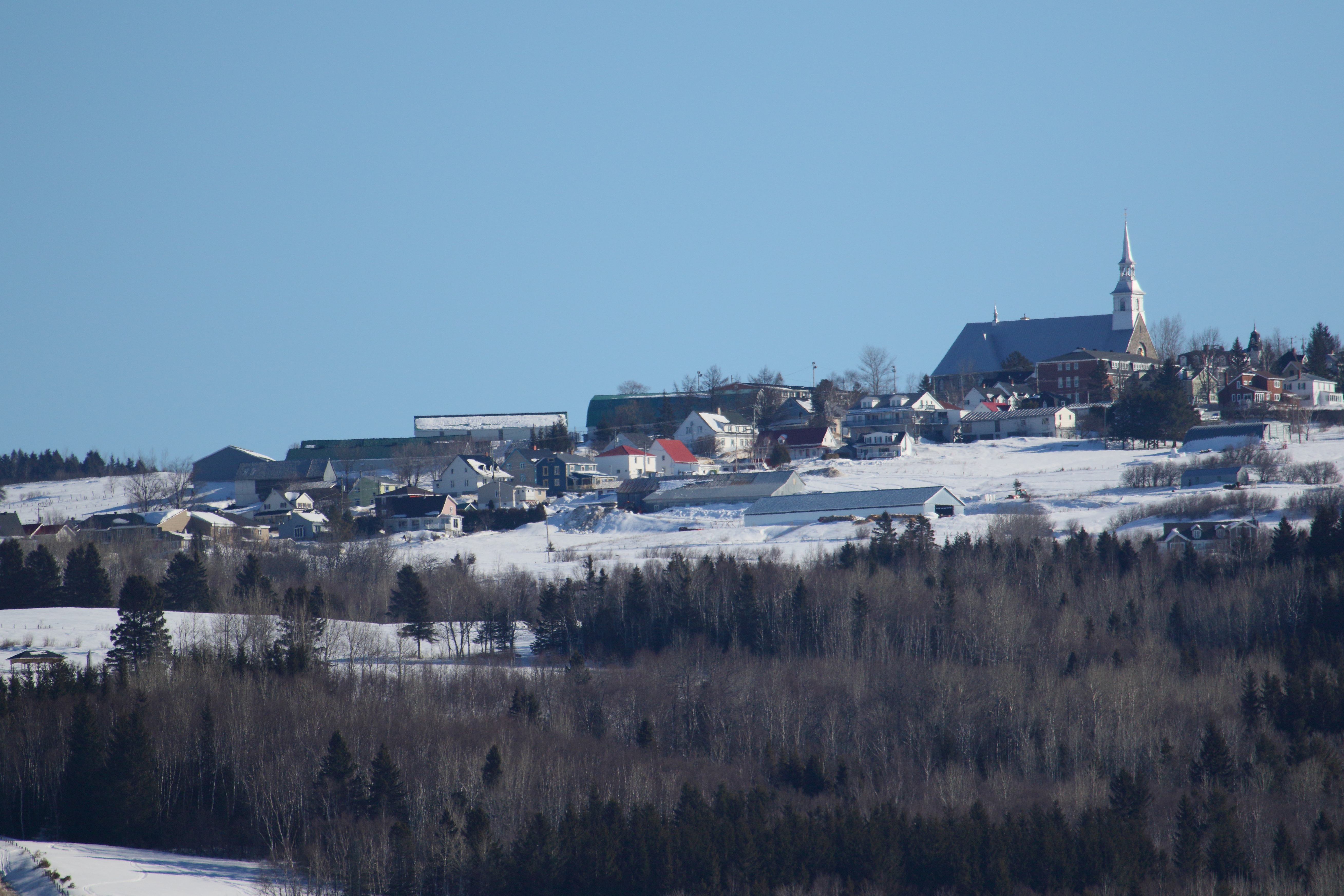 Les Éboulements